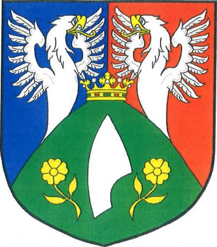 Orličky znak